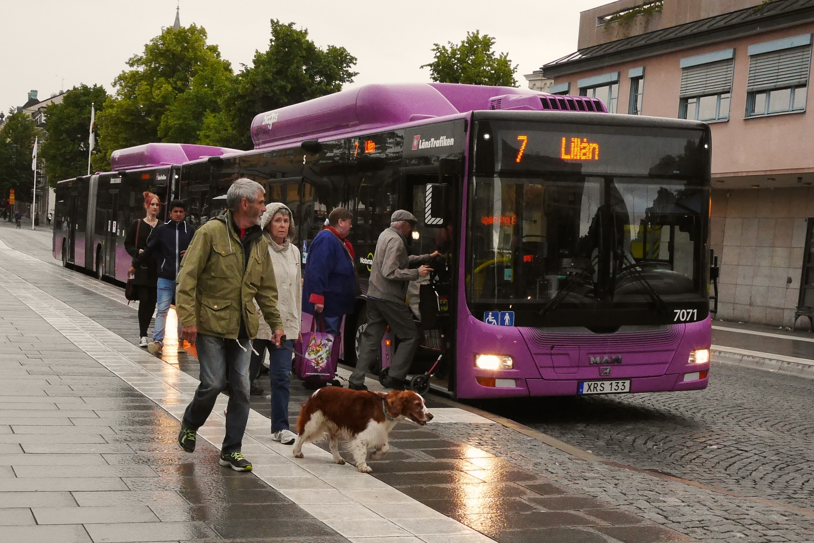 Stadsbuss av fabrikatet MAN i Örebro stad.